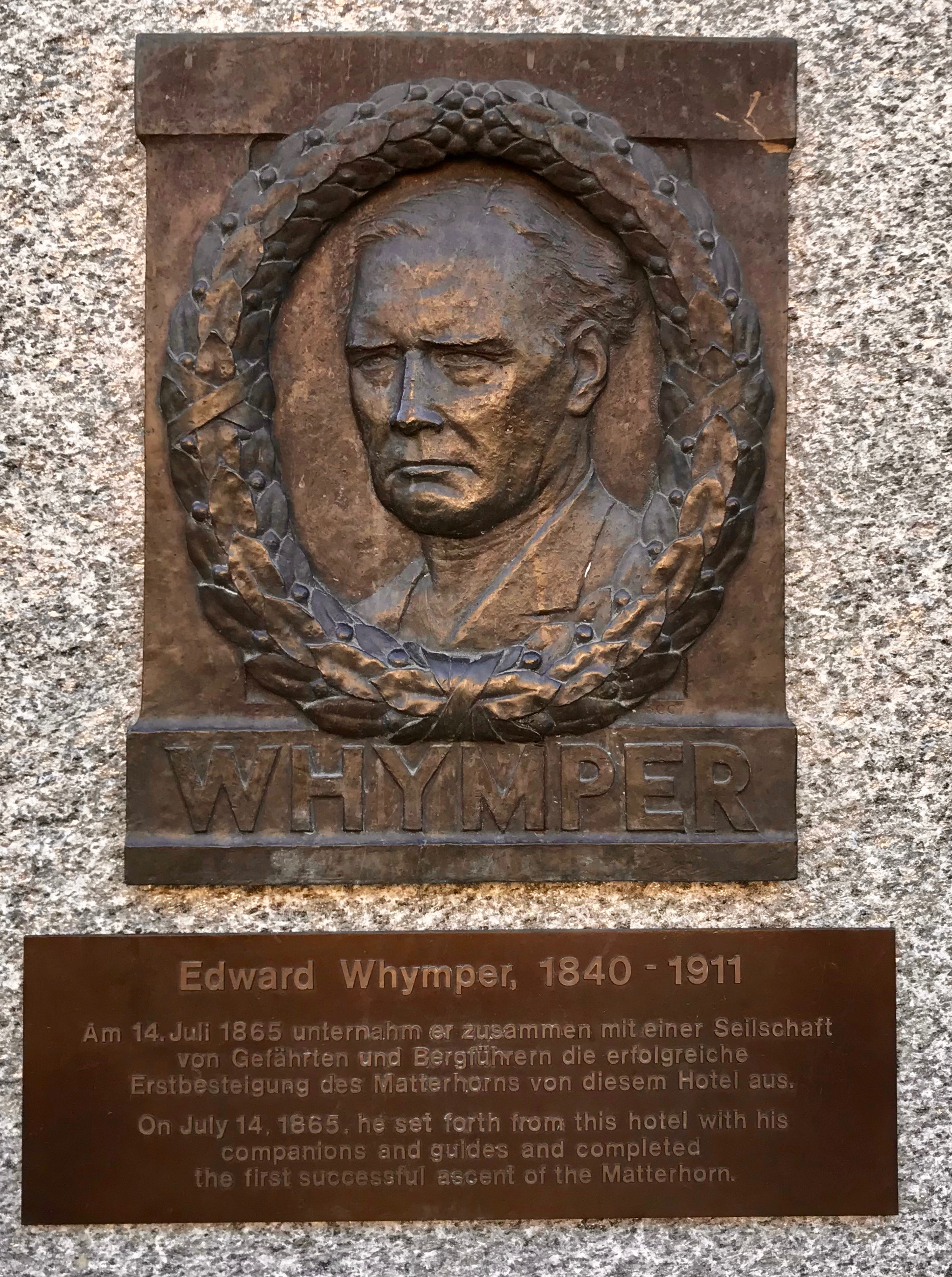 Gedenktafel am Hotel Monte Rosa in Zermatt